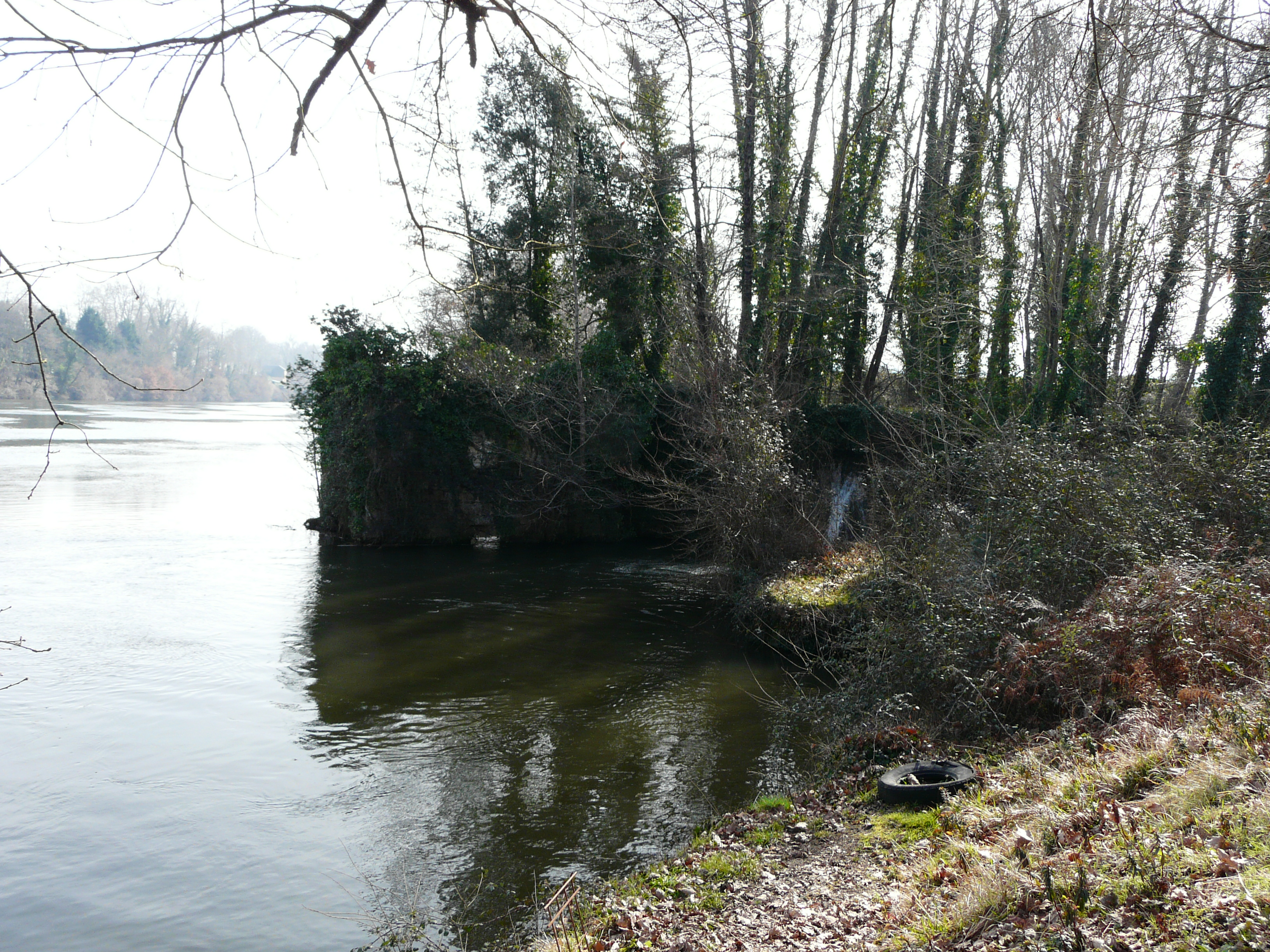 Le confluent de la Dordogne (au premier plan et à gauche) et du Couzeau (dont on perçoit une cascade sur la droite) ; lieu-dit le Port de Lanquais, Varennes, Dordogne, France.